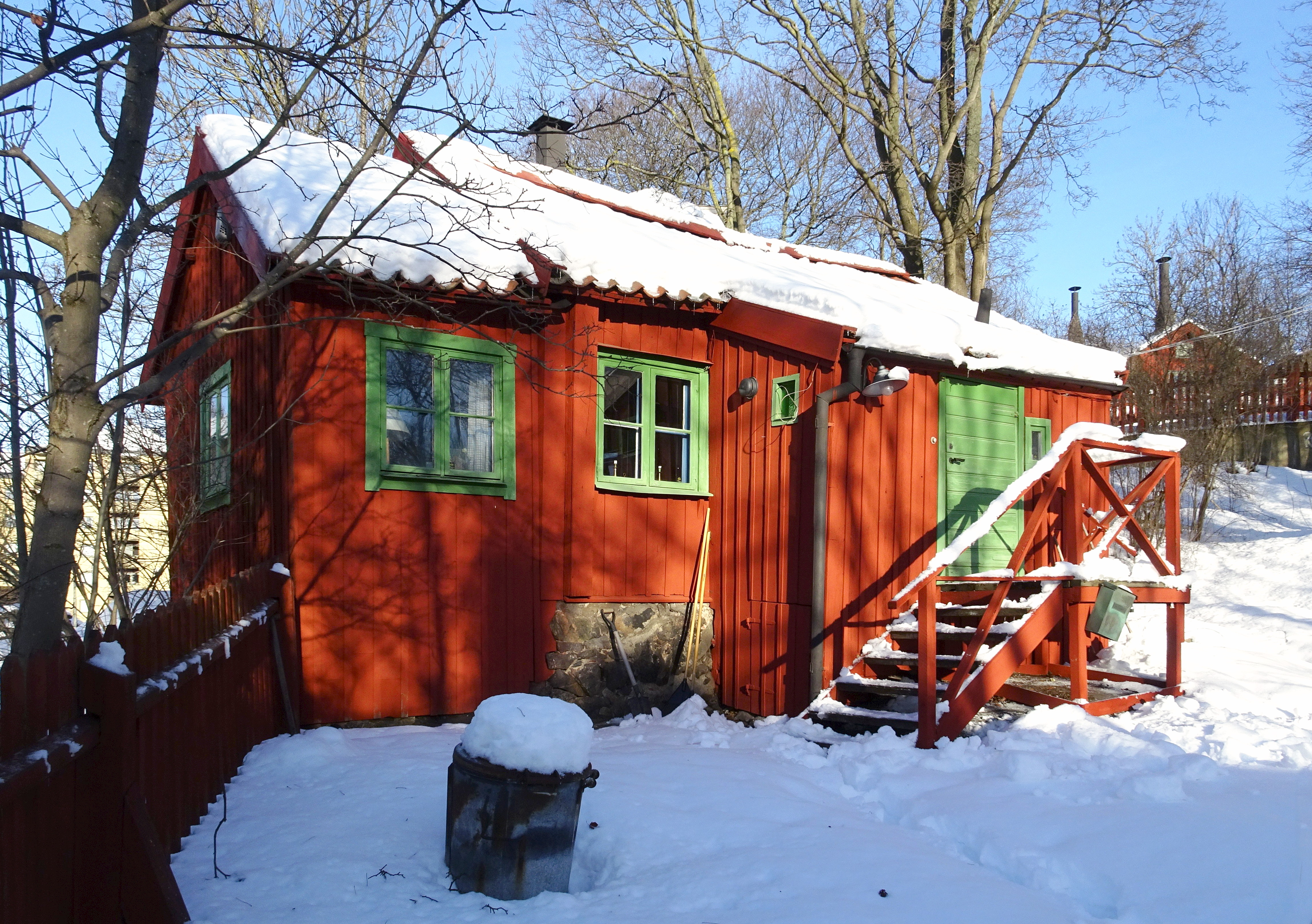 Svenska Ords skrivstuga i Vitabergsparken